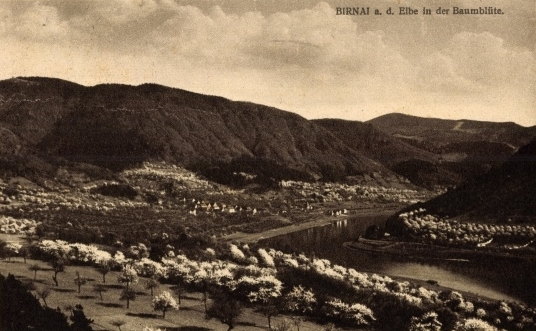 Birnai an der Elbe in der Baumblüte Česky: Zemědělská oblast Brné nad Labem ve 20. letech 20. století